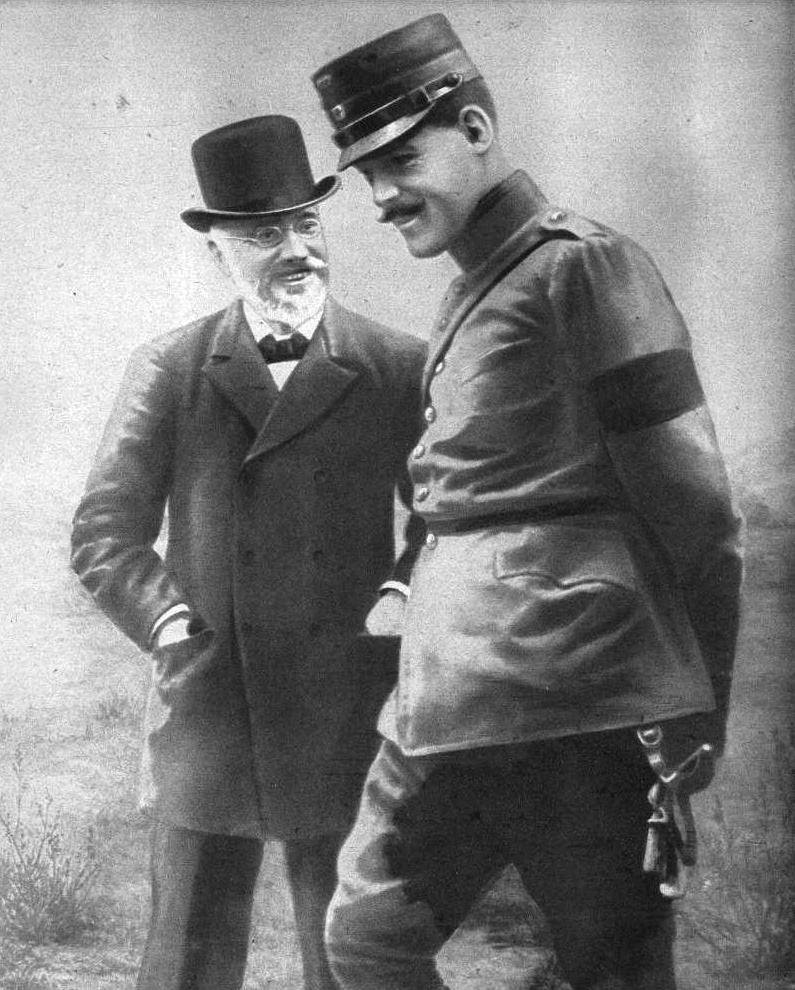 Constantin 1 de Grèce et Eleftherios Venizelos.